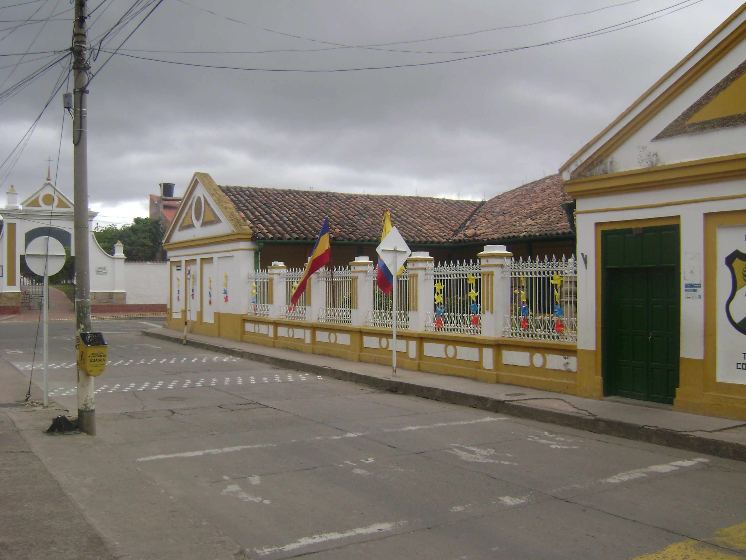 momentos previos al desfile del 20 de julio de 2013 en Guasca, Cundinamarca, Colombia